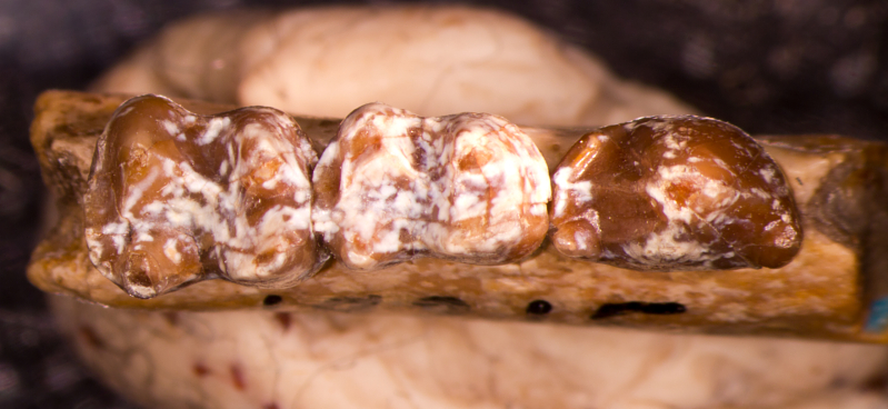 Hexacodus pelodes Gazin